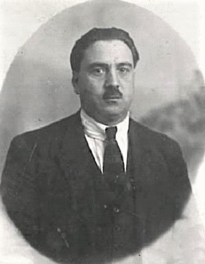 Alessandro Bagnato